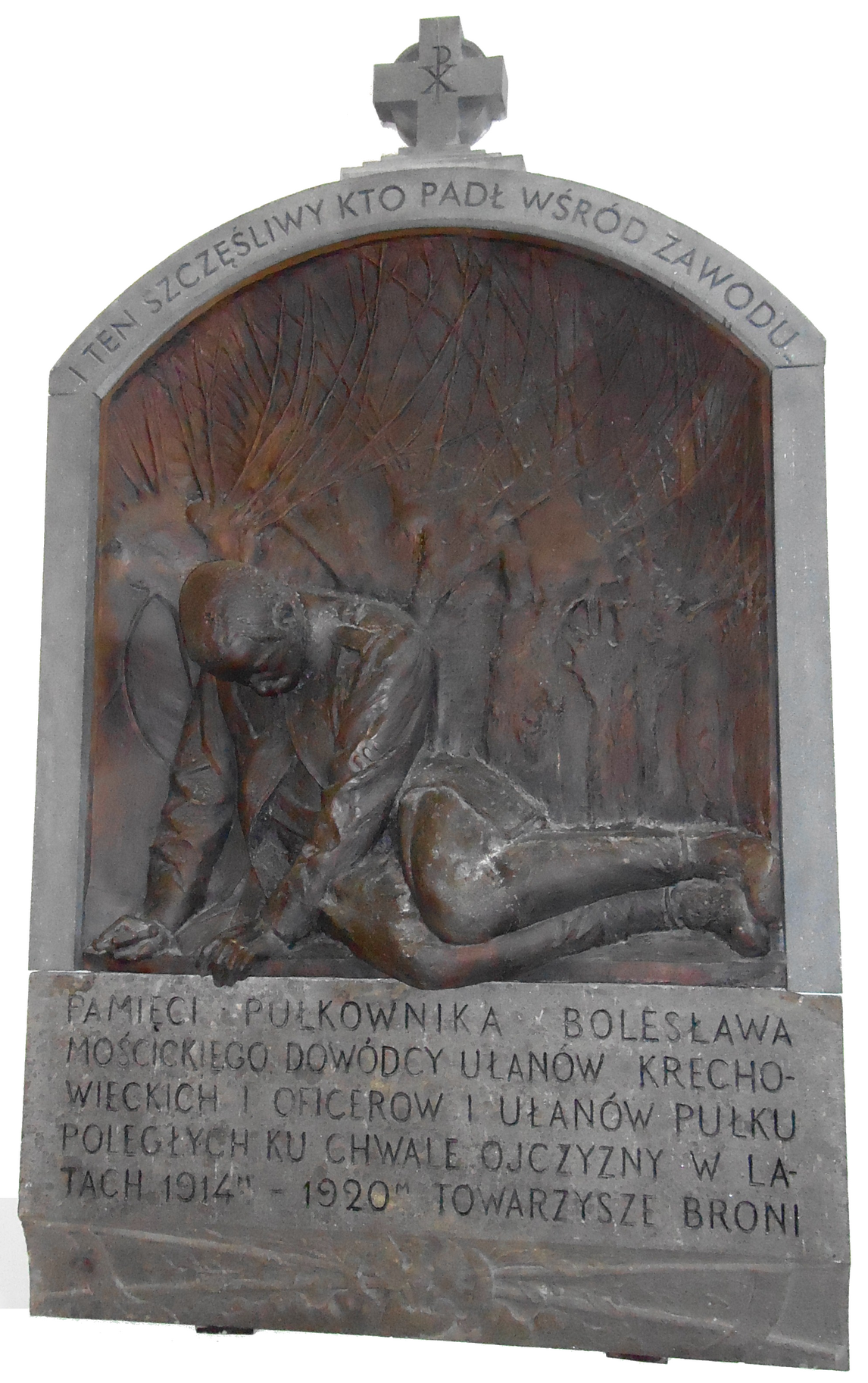 Tablica pamiątkowa Bolesława Mościckiego i ułanów 1 Pułku Ułanów Krechowieckich w Bazylice Św. Krzyża w Warszawie przy ul. Krakowskie Przedmieście 3